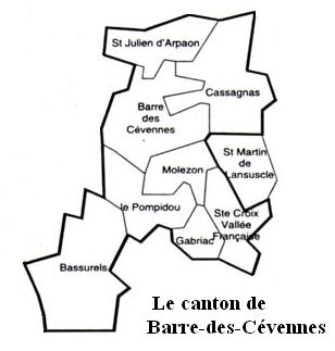 Le canton de Barre-des-Cévennes Image personnelle